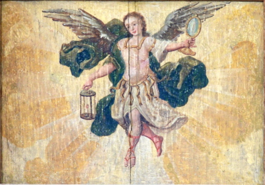 S. Uriel, das Liecht gottes, Der getreue Erleichtungs Engl – Heiliger Uriel , Engelsfürst (Erzengel), dem Licht und Feuer Gottes. Uriel, der vierte Erzengel (hebr. Mein Licht ist Gott), ist der Herr der Ordnung und der Harmonie. Seine Farbe ist silbrig-weiß. Uriel wird in der westkirchlichen Bibel nicht namentlich erwähnt, nur im 4. Buch Esra, das nur von einigen Orthodoxen Kirchen als biblisch anerkannt wird. Nach katholischer Auffassung steht er im Süden vor Gottes Thron.